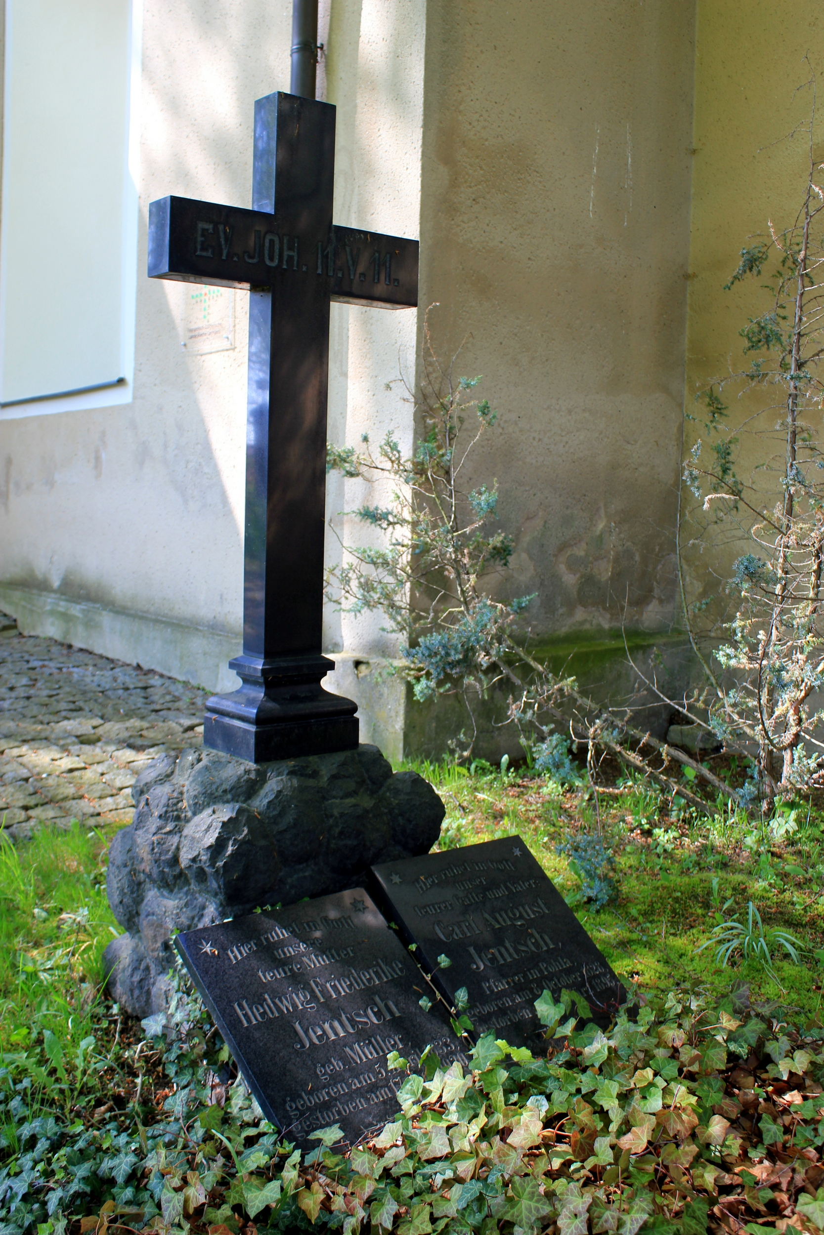 Hornjoserbsce: Narowny kamjeń Korle Awgusta Jenča w Palowje.